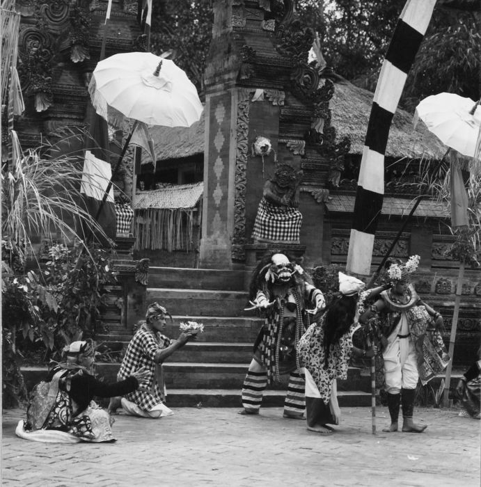 Negatief. Scene uit een Barong- en Krisdans in het voorhof van de dorpstempel waarin Rangda de zoon van Dewi Kunti opeist